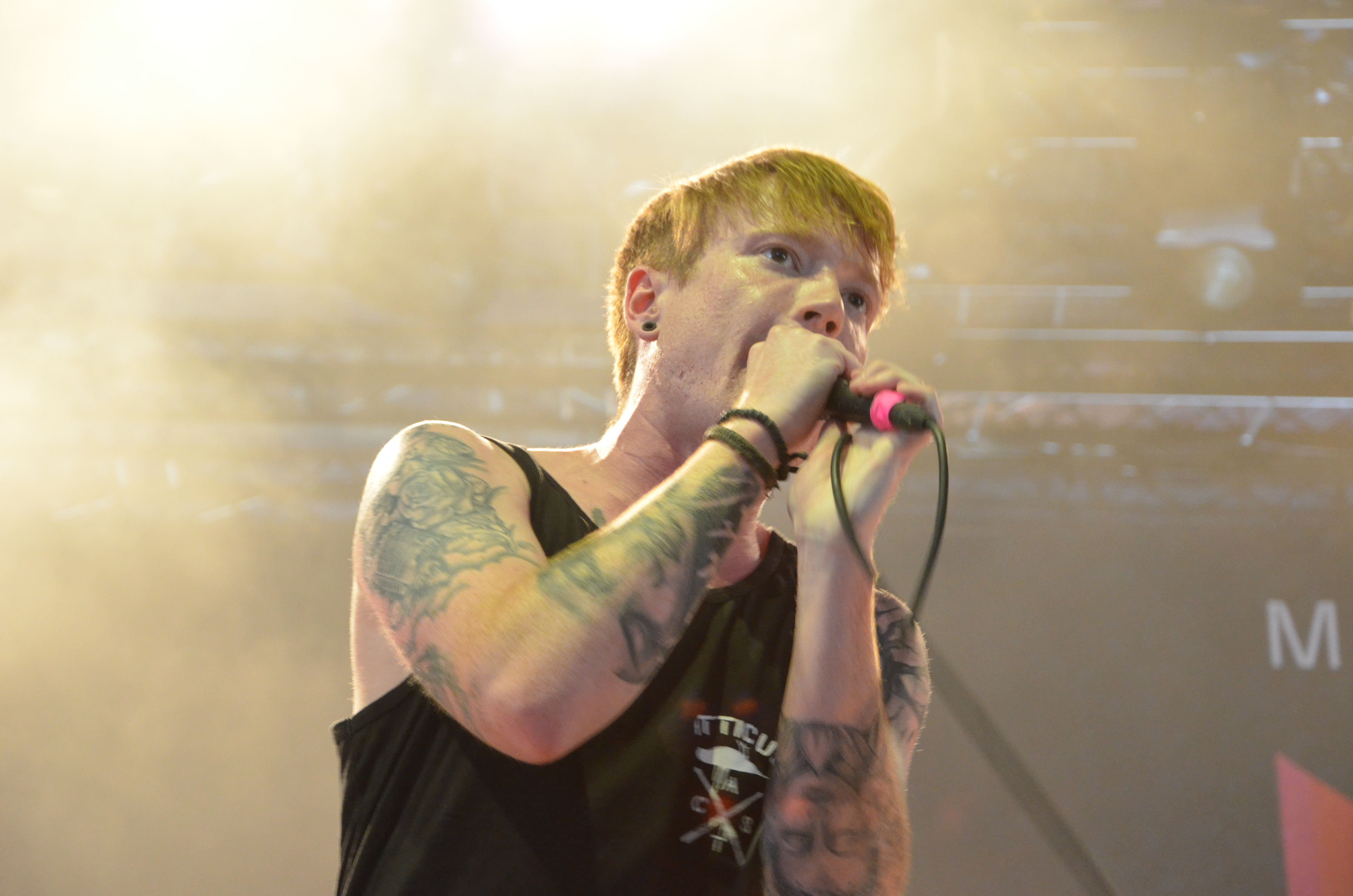 Mallory Knox spielen bei Rock am Ring 2015 in Mendig.